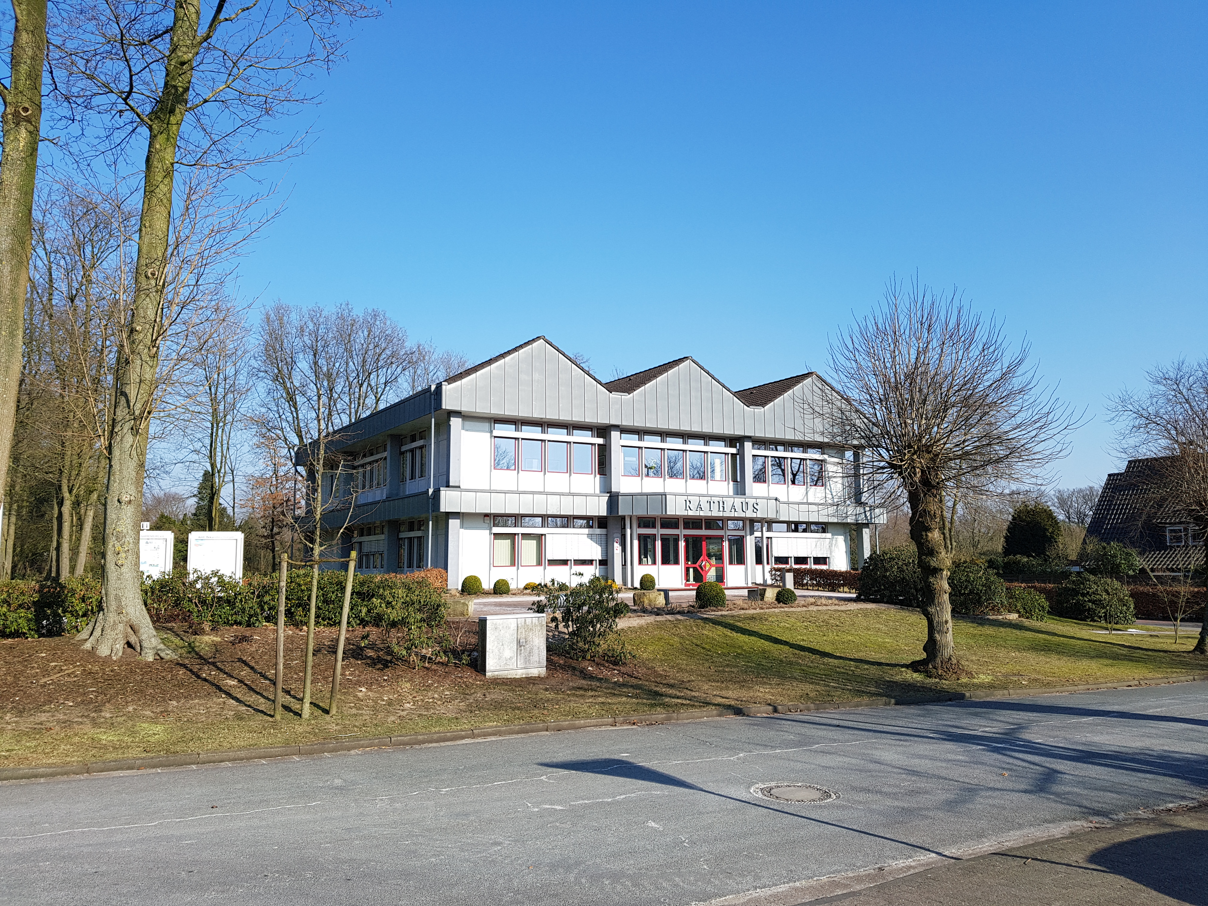 Dat Raadhuus in Gnarrenborg